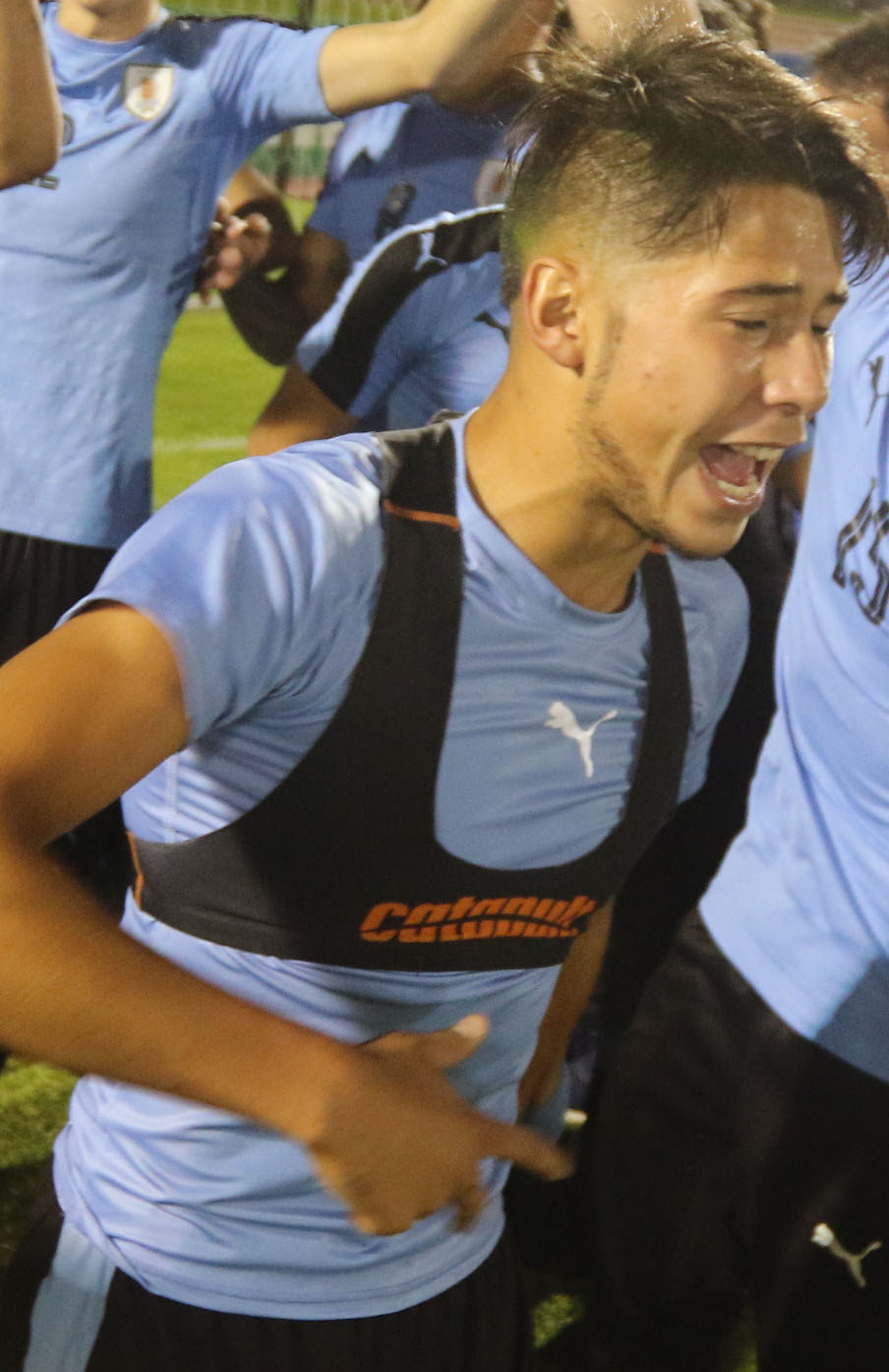 Quito 11 Feb (Andes).- Festejos y celebraciones por el triunfo del campeonato sudamericano de fútbol sub 20. La celeste uruguaya festejó la victoria del campeonato con gran emotividad. Fotografías: Carlos Rodríguez/Andes.